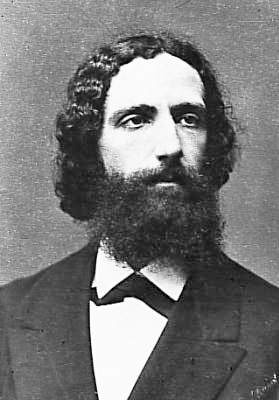 Description: Austrian philosopher Franz Brentano